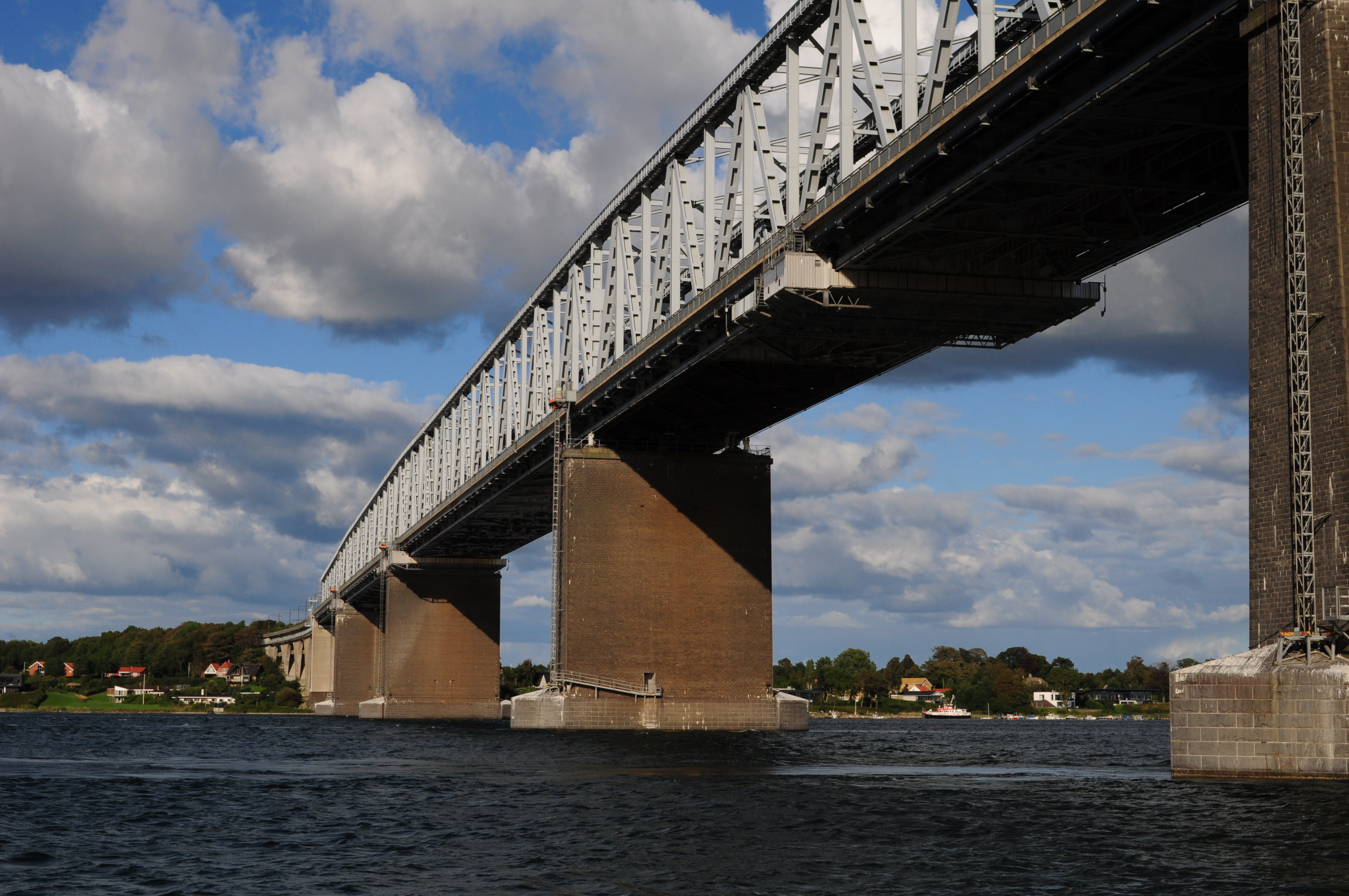 Lillebæltsbroen set under gennemsejling